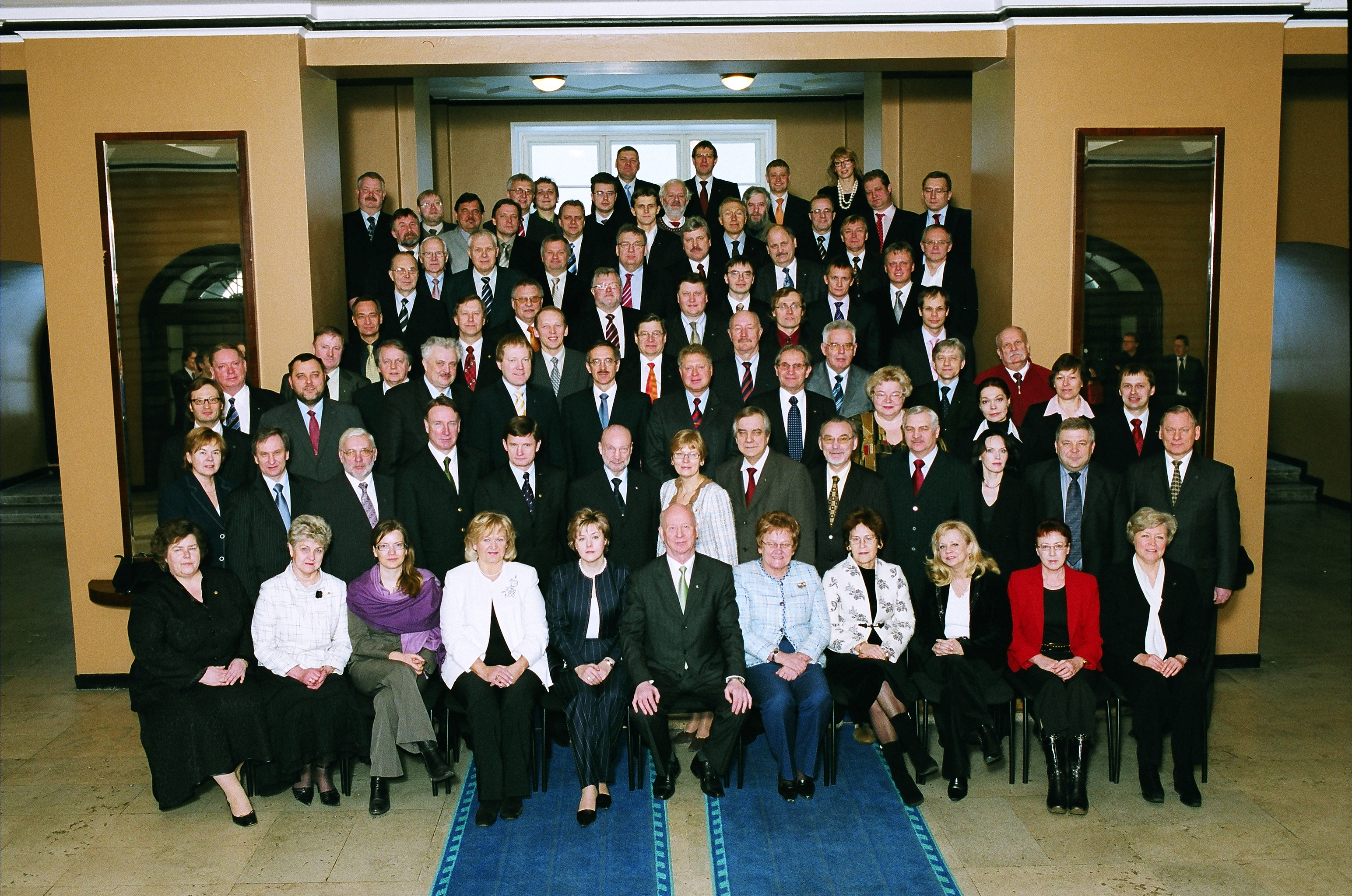 X Riigikogu koosseisu lõpupilt 22. veebruaril 2007.